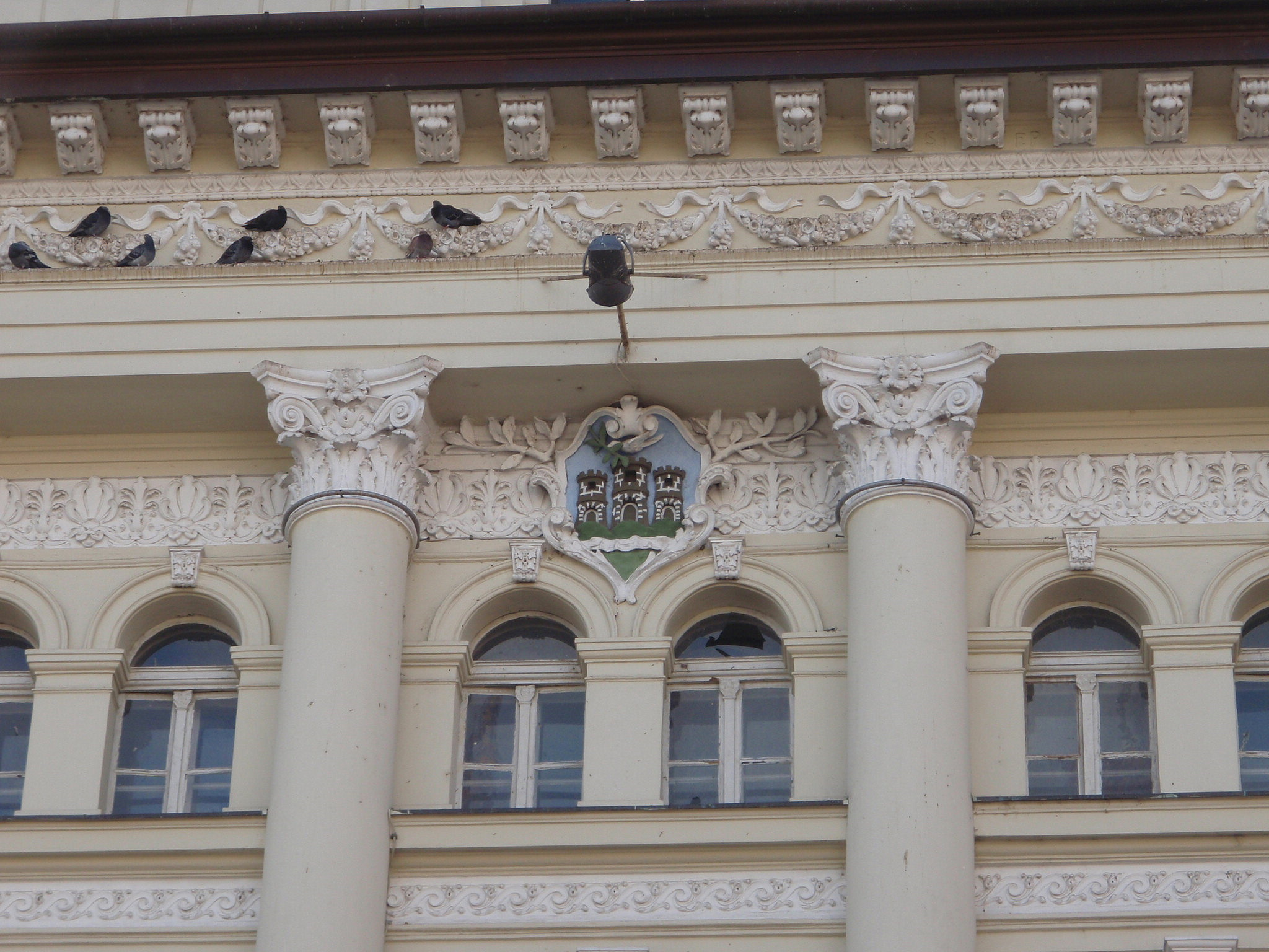 Grb grada Novog Sada na Gradskoj kući